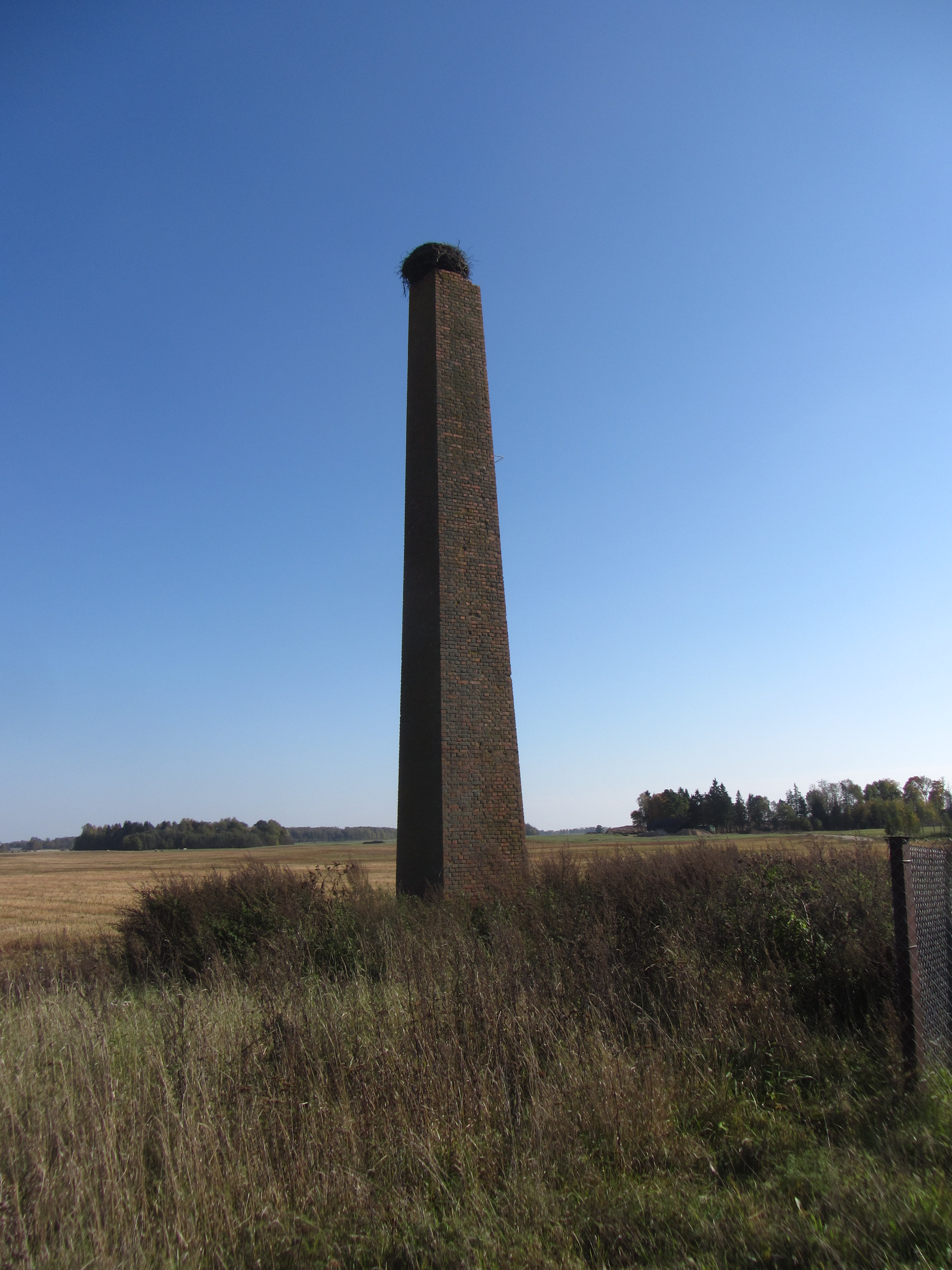 Pandėlio sen., Lithuania